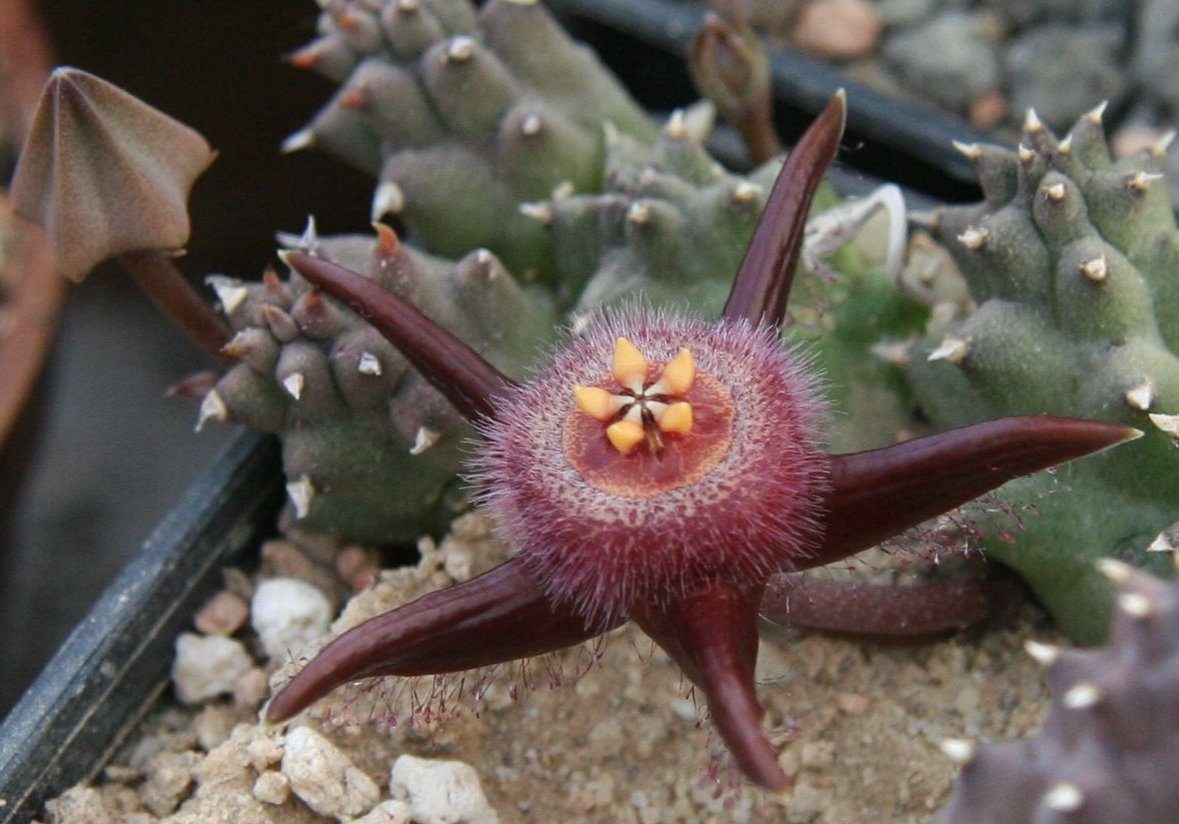 Duvalia corderoyi in Blüte